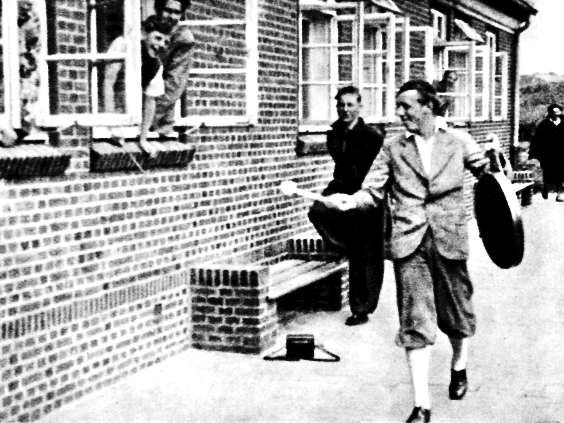 Ein älterer Schüler trägt 1931/32 den Schulgong über das Schulgelände, hier entlang der Ostseite der 'Arche'. Seine Schläge signalisieren z. B. den Unterrichtsbeginn und Pausen. Rechts hinten ist evtl. Schulgründer und -leiter Martin Luserke (1880–1968) zu erkennen.